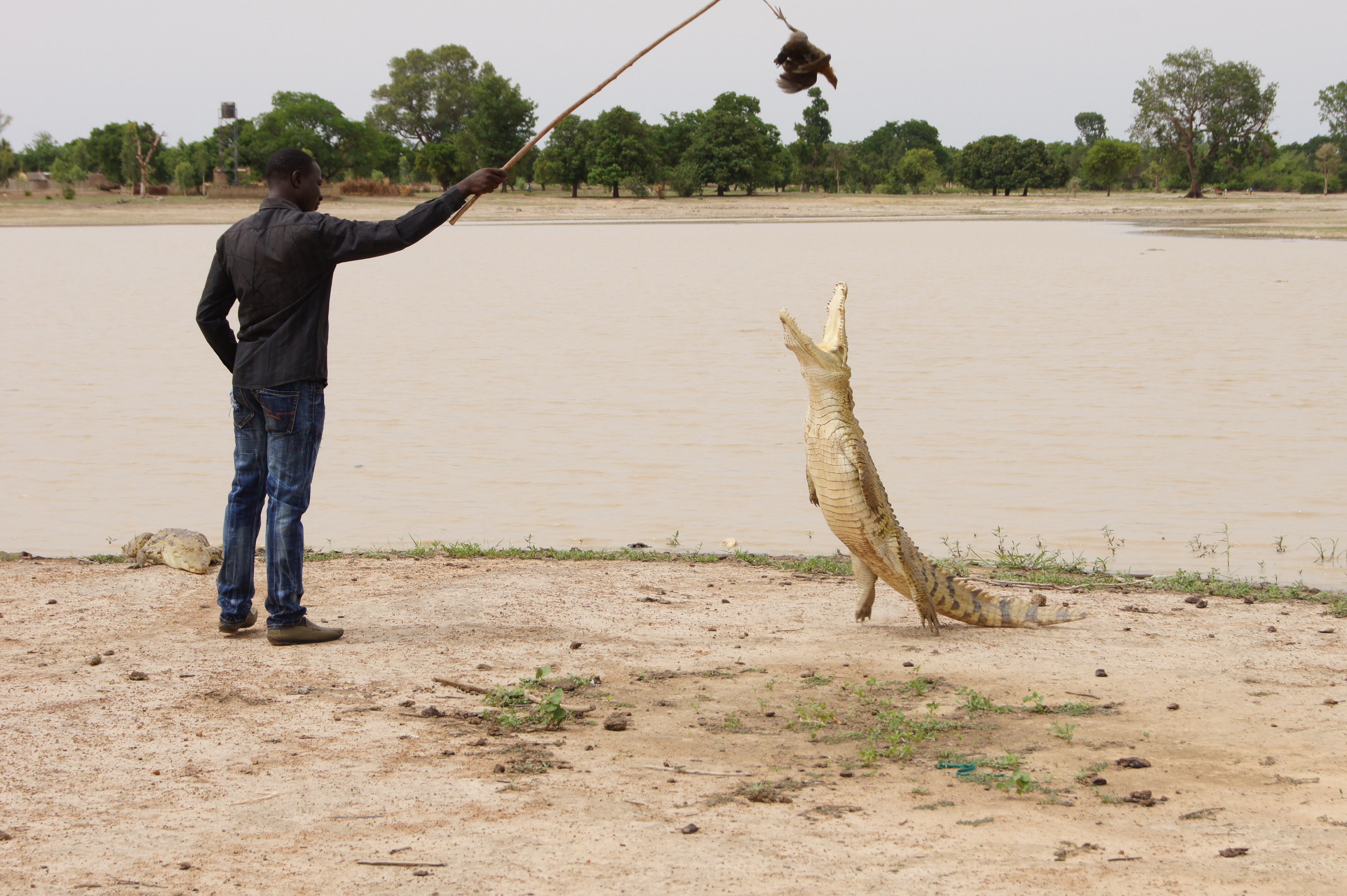 Guide touristique auprès des Crocodiles Sacrés, à proximité de Ouagadougou This is an image of "African people at work" from Burkina Faso